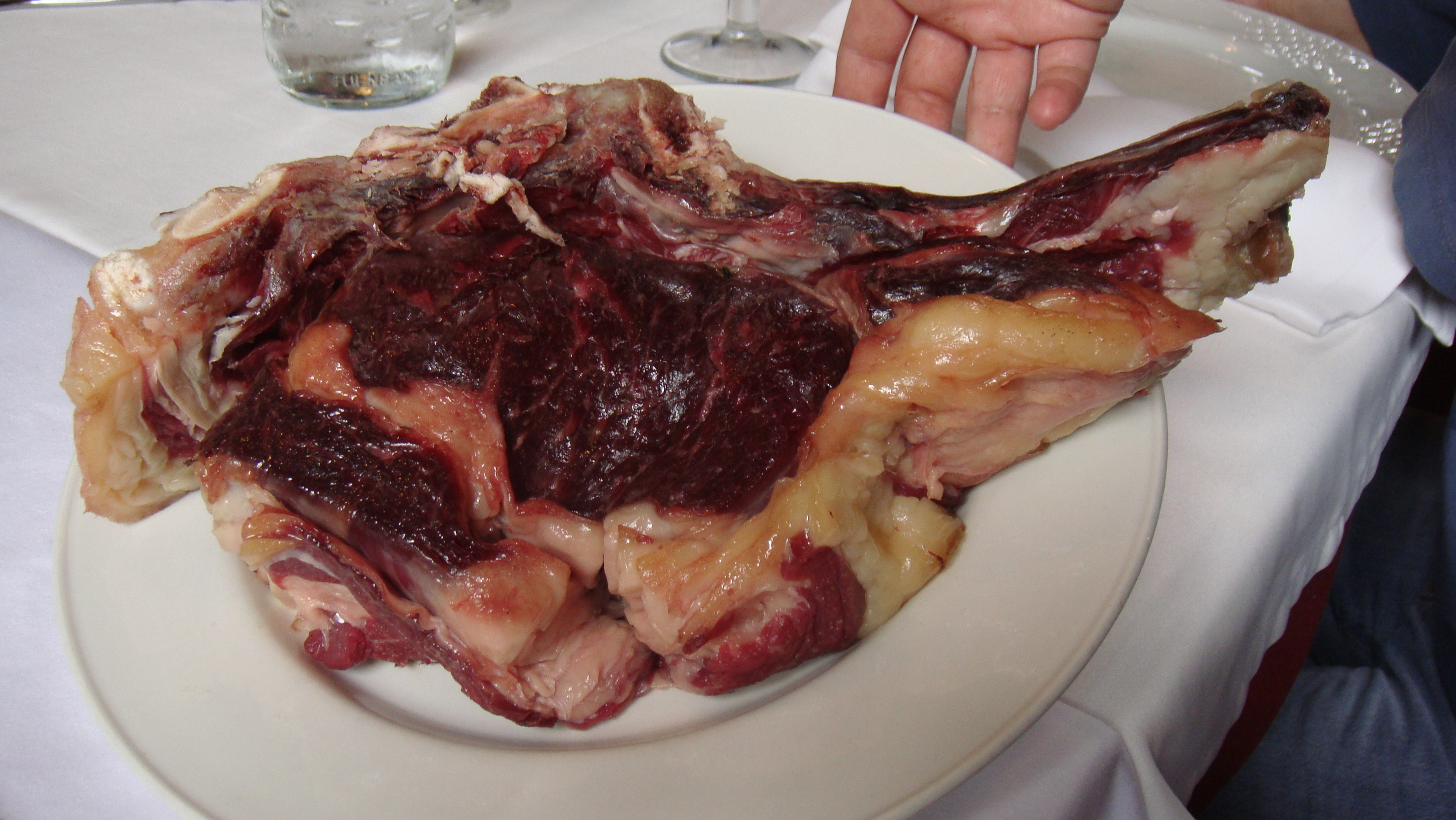 Chuletón de unos 2 kg de peso. El chuletón proviene de una vaca de raza gallega de 5 años y 8 meses y 430,90 kg de peso. El chuletón ha estado en maduración 90 días.